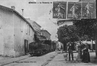 Une vue de Gémozac durant les années 20.